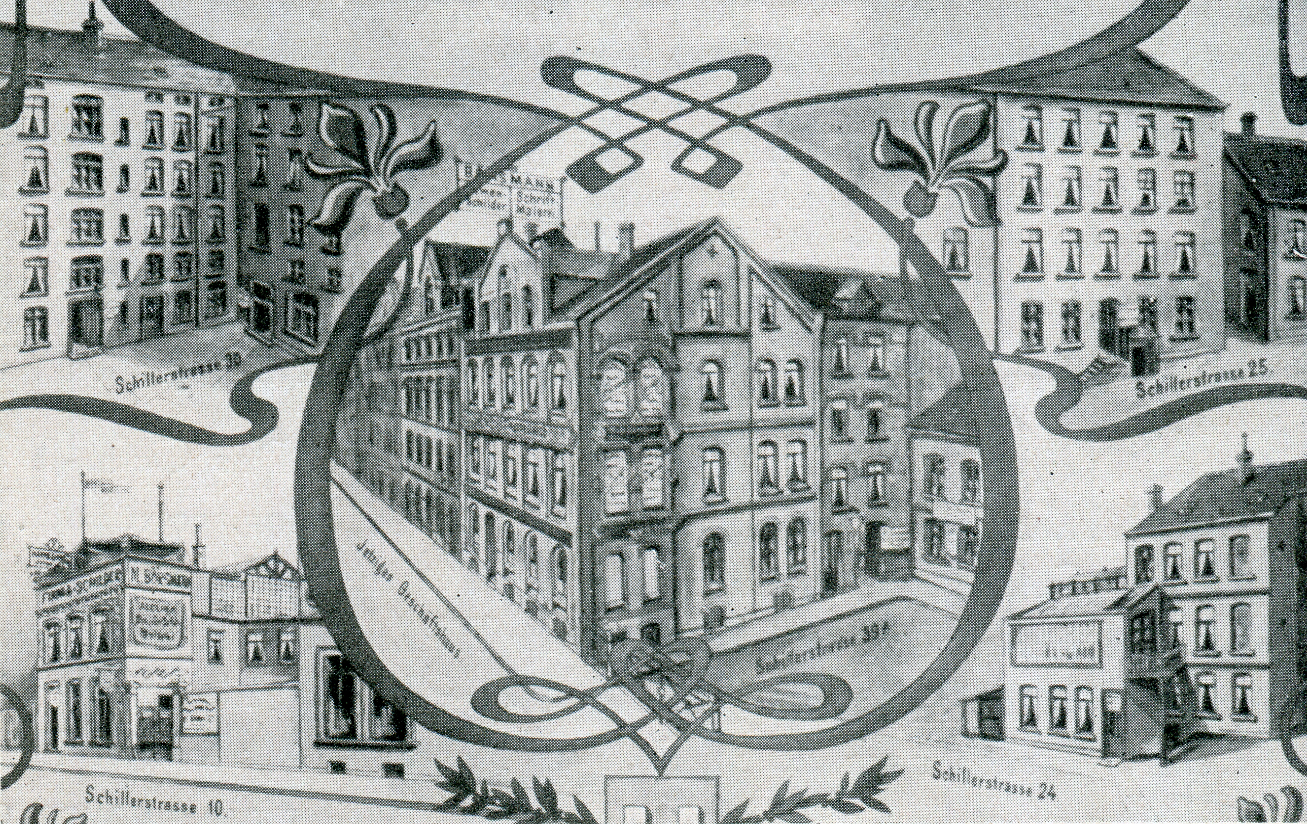 Durch Schmuckrahmen in fünf Felder aufgeteilte Zeichnung mit den verschiedenen Gebäuden in der Schillerstraße, in denen der Schriftmaler, Graphiker und Schriftsteller Martin Börsmann sein Atelier und „Spezialgeschäft für Schrift- und Schildermalerei“ eingerichtet hatte. Nach seiner Rückkehr aus Amerika hatte er am 14. Februar 1877 sein Unternehmen zunächst in der Schillerstraße 30 eröffnet und zog dann in der selben Straße viermal um in die Hausnmmern 10, 25 und 24. Nach dem Tod des Unternehmensgründers übernahm sein ehemals erster Lehrling, Heinrich Dorsfeld, am 21. April 1903 das Geschäft. Im Mai 1919 verlegte er den Betrieb in das Haus Osterstraße 78 ...